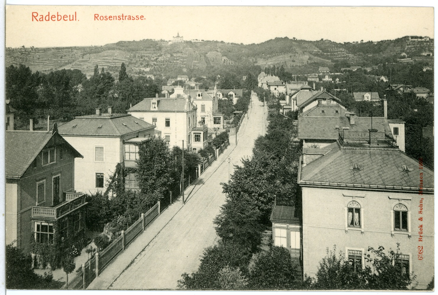 Radebeul; Rosenstraße This postcard is from publisher Brück & Sohn in Meißen ( postcard has a unique number 06082 and is available in a higher resolution at the publisher. This images was uploaded in a cooperation project between Wikipedians and the publisher.